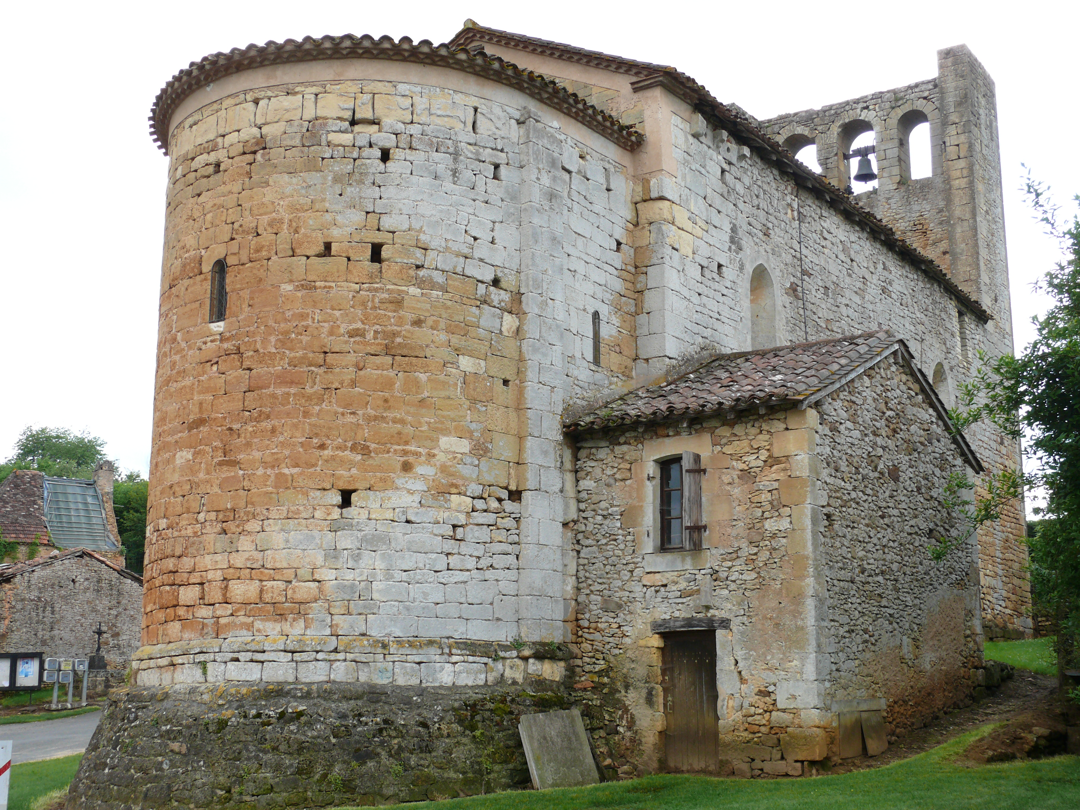 Larzac - Eglise Sainte-Magdeleine